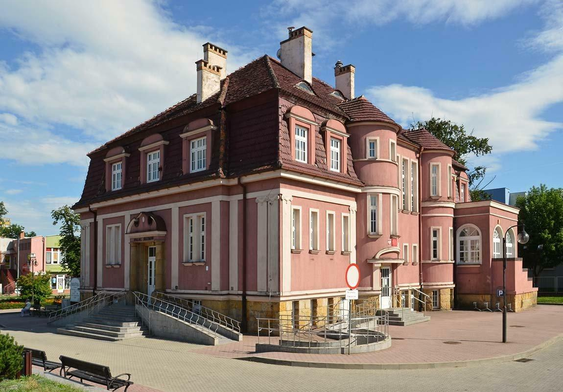 Pałac Ślubów